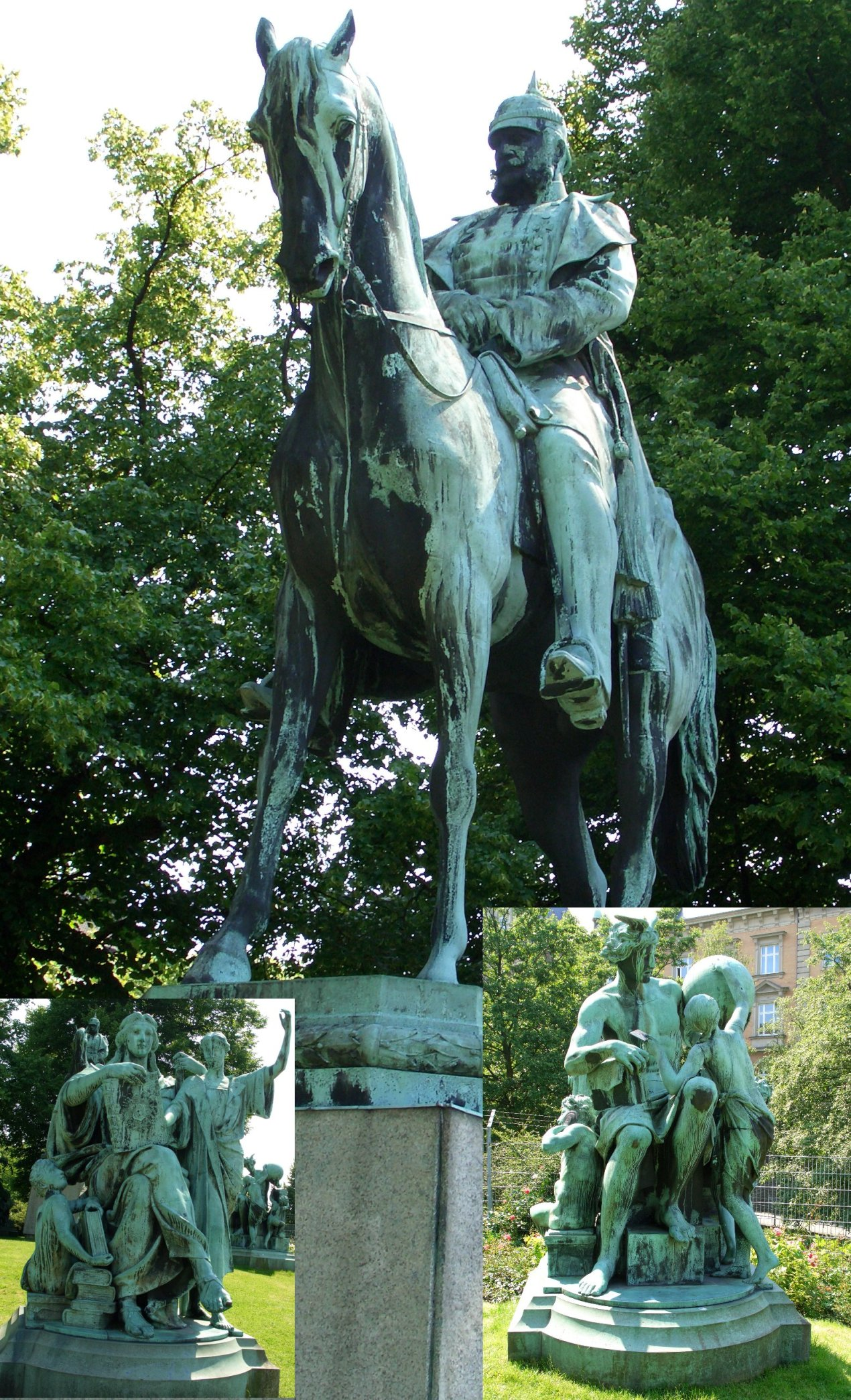 Beschreibung / Standort: Kaiser Wilhelm Denkmal in Planten und Blomen (schräg gegenüber der Hamburger Musikhalle) Aufgenommen am 15.6.2005 Von mir selbst aufgenommen Beschreibung: Das Reiterstandbild mit den Figurengruppen gehören zu dem Denkmal, das 1903 für Kaiser Wilhelm I., den Begründer des deutschen Reiches, von Senat und Bürgerschaft errichtet wurde. Der Entwurf von Johannes Schilling entstand bereits 1889 anlässlich des Wettbewerbs für das Berliner Nationaldenkmal. Bei der Umsetzung des Denkmals 1930 wurden Teile des Denkmals an den Sievekingsplatz versetzt und 1997 am jetzigen Standort neu zusammengefügt.